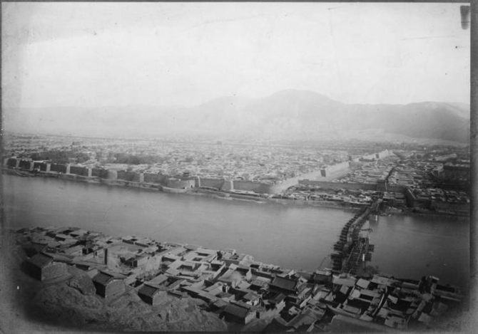 罗伯特·斯特林·克拉克于1909年拍摄的兰州城和黄河，右下角是当时的黄河镇远浮桥及正在修建的兰州黄河铁桥（后改名“中山桥”）。收录于《穿越陕甘：1908～1909年克拉克考察队华北行纪》